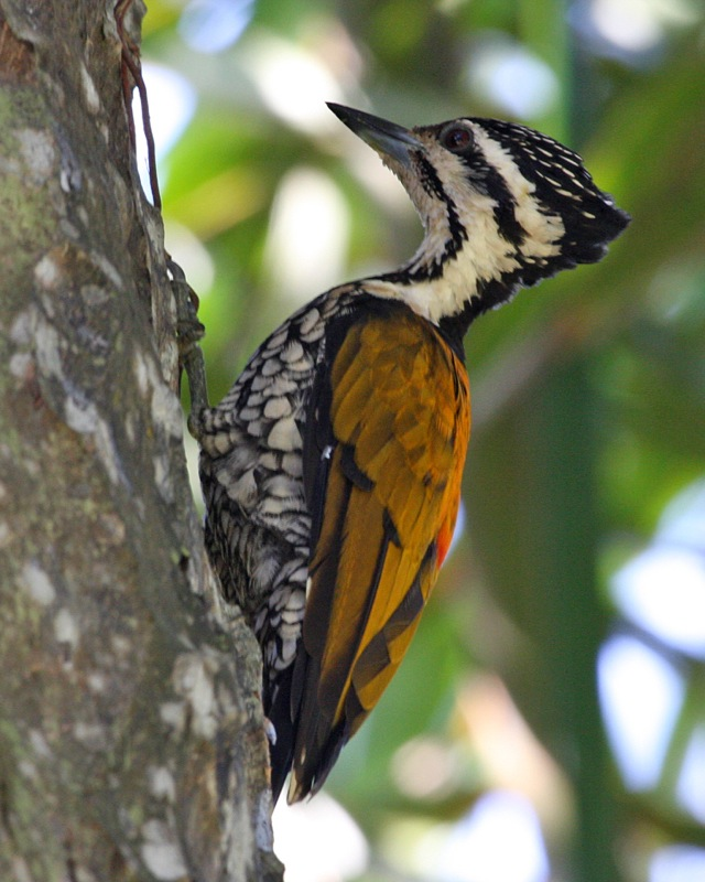 Common Flameback - female Dinopium javanense Dinopium javanense javanense aka Picus javanensis, Dinopium javanese Singapore Botanic Garden 21st. December 2008 Malay: Belatuk, Belatuk Pinang Kecil, Burung Belatuk